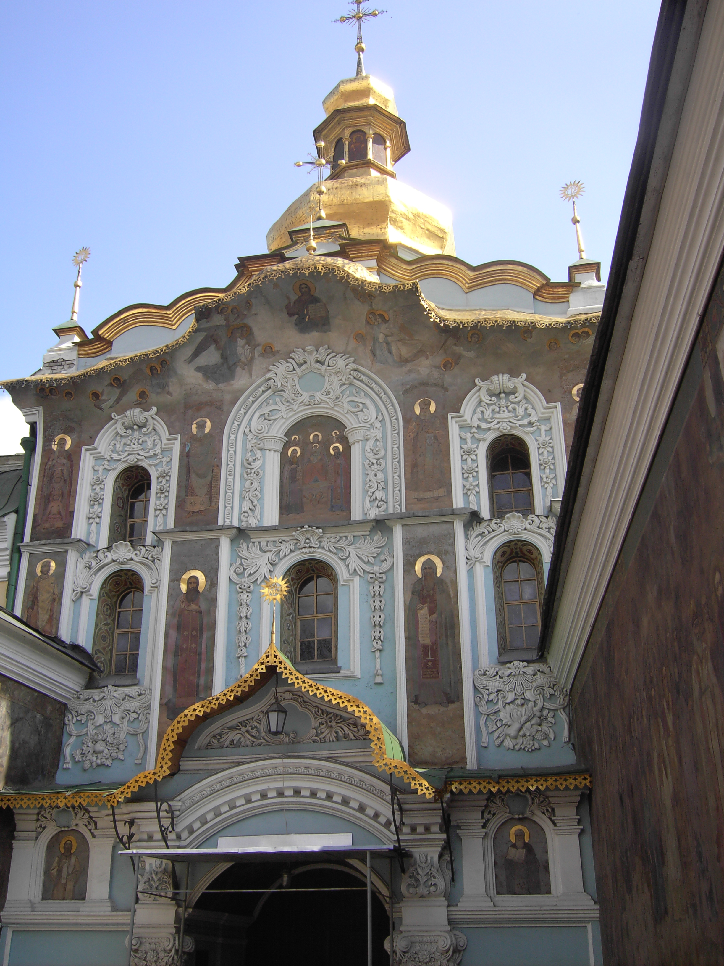 Eingangstor des Höhlenklosters in Kiew UA